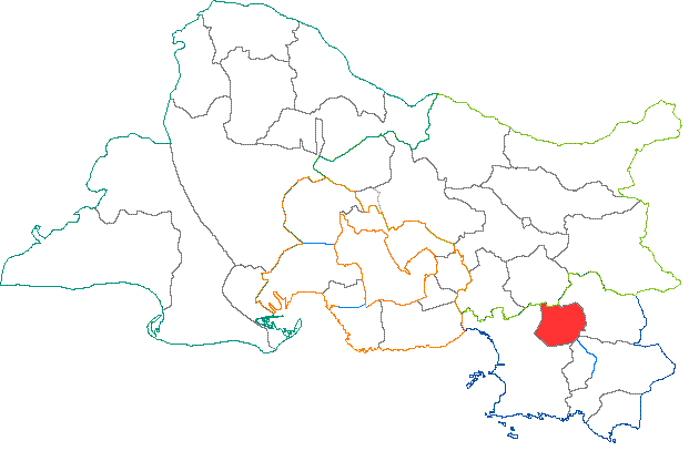 Situation du canton dans le département des Bouches-du-Rhône (France)